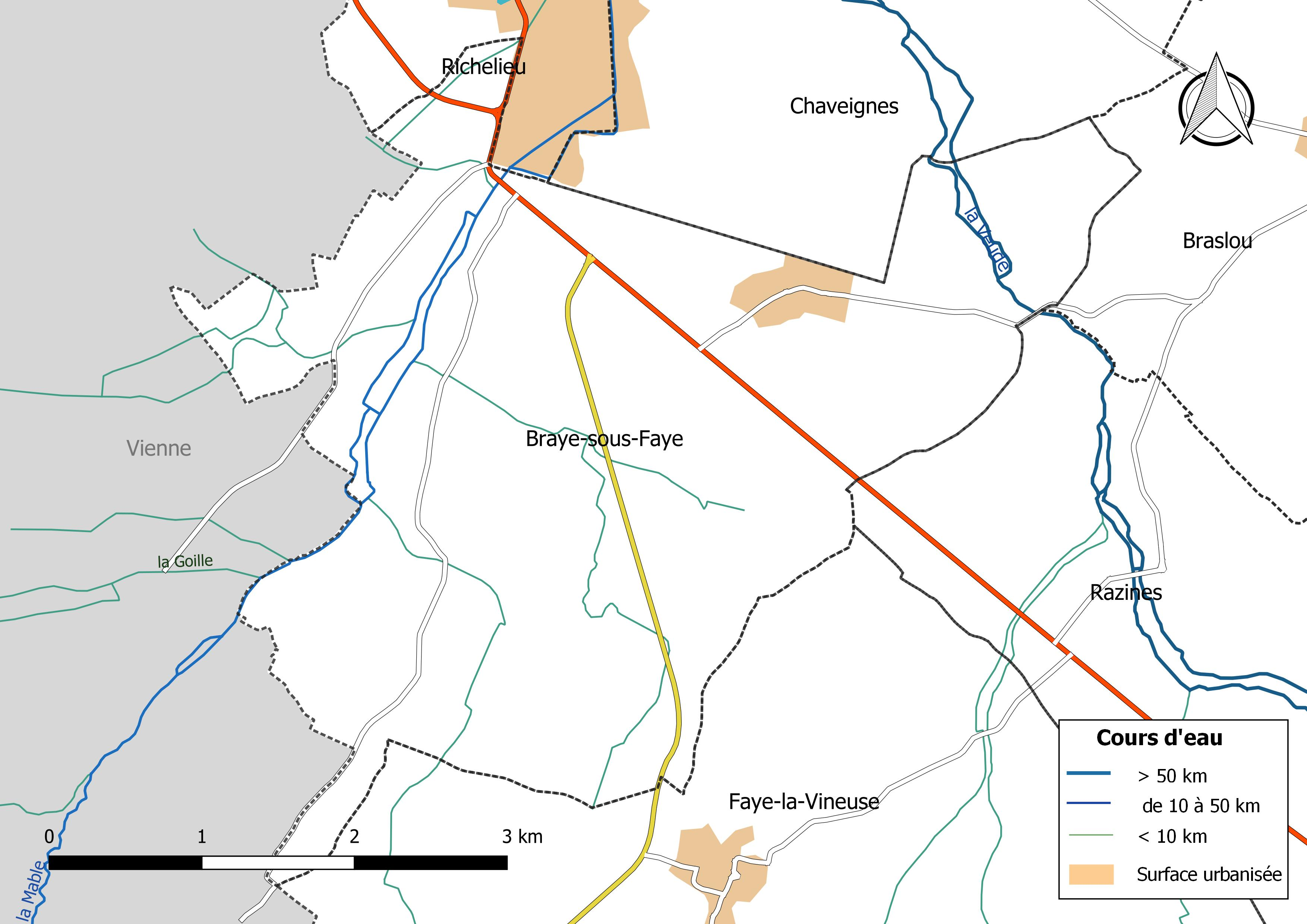 Carte du réseau hydrographique de la commune de Braye-sous-Faye (France).